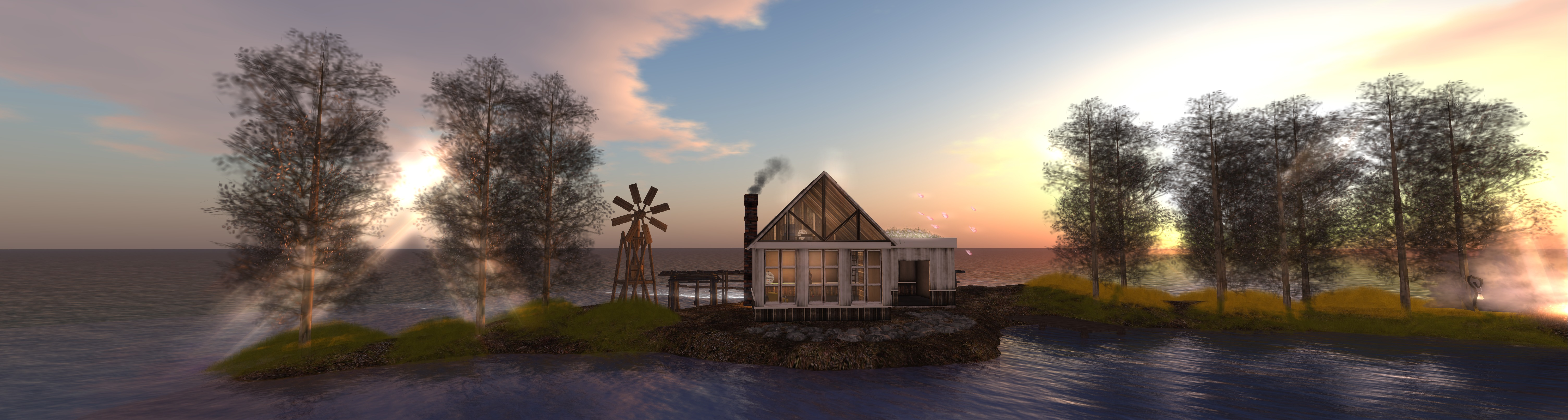 Landschaft in Second Life (Screenshot)